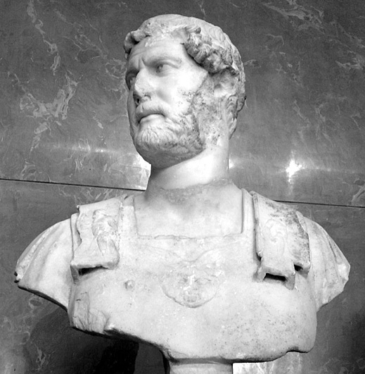 Publius Aelius Traianus Hadrianus